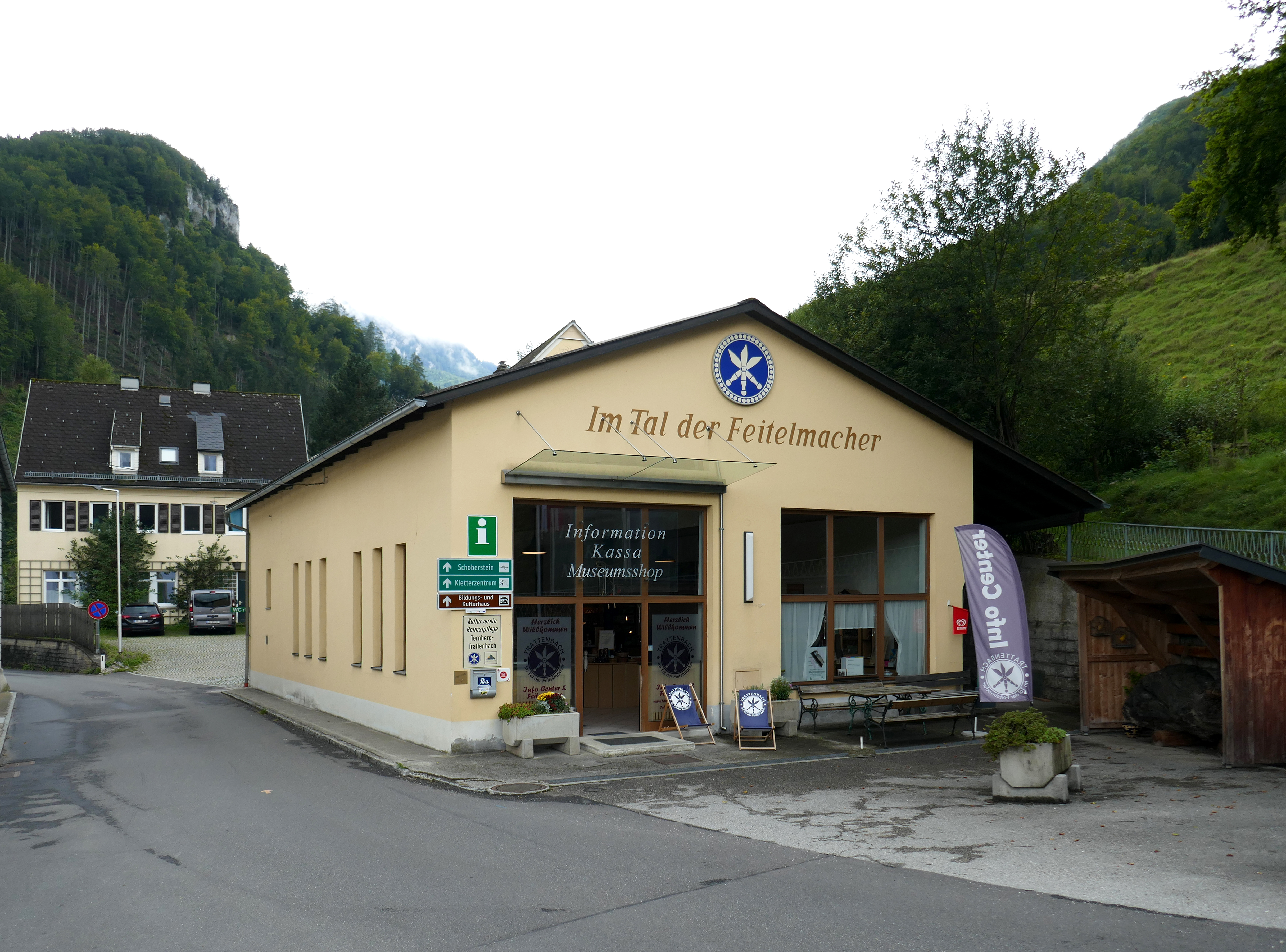 Im Tal der Feitelmacher, Trattenbach - Info Center.